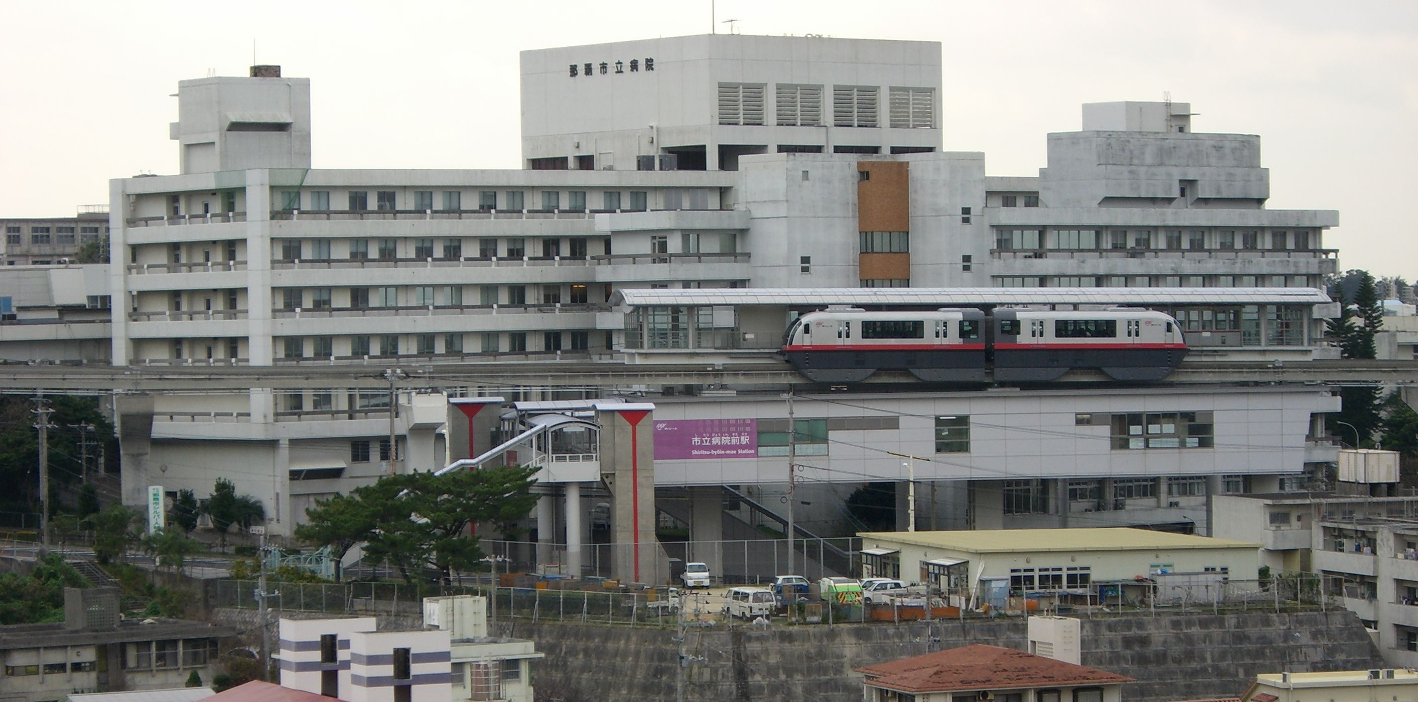 Naha City Hospital in Okinawa, Japan. (沖縄県の那覇市立病院。末吉公園より撮影。)